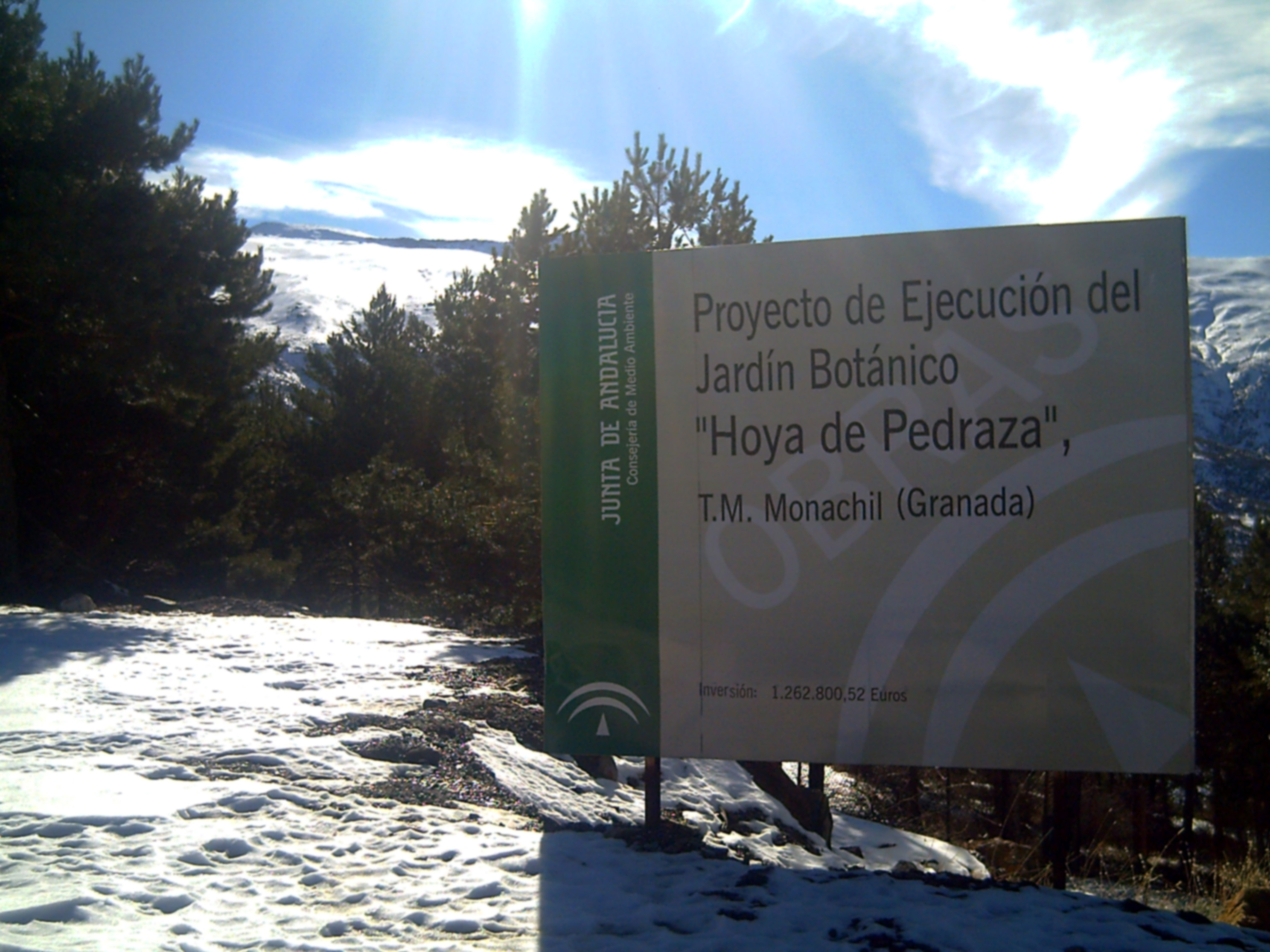 Hoya de Pedraza Botanical Garden in Sierra Nevada (Spain)